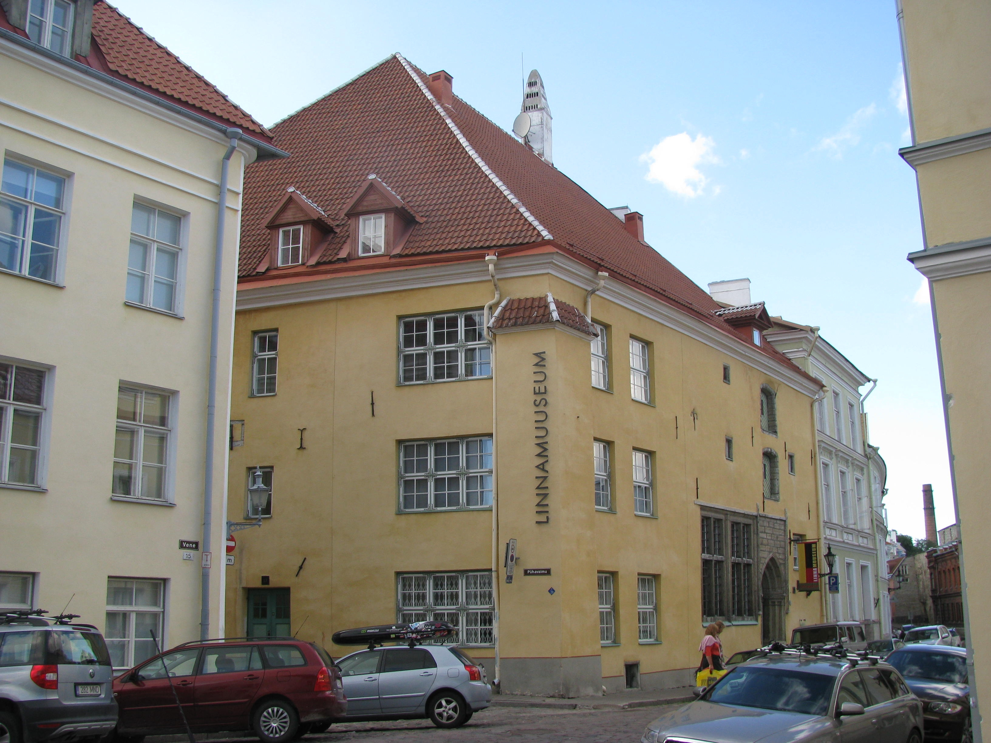 Tallinna Linnamuuseumi hoone Vene tänaval.